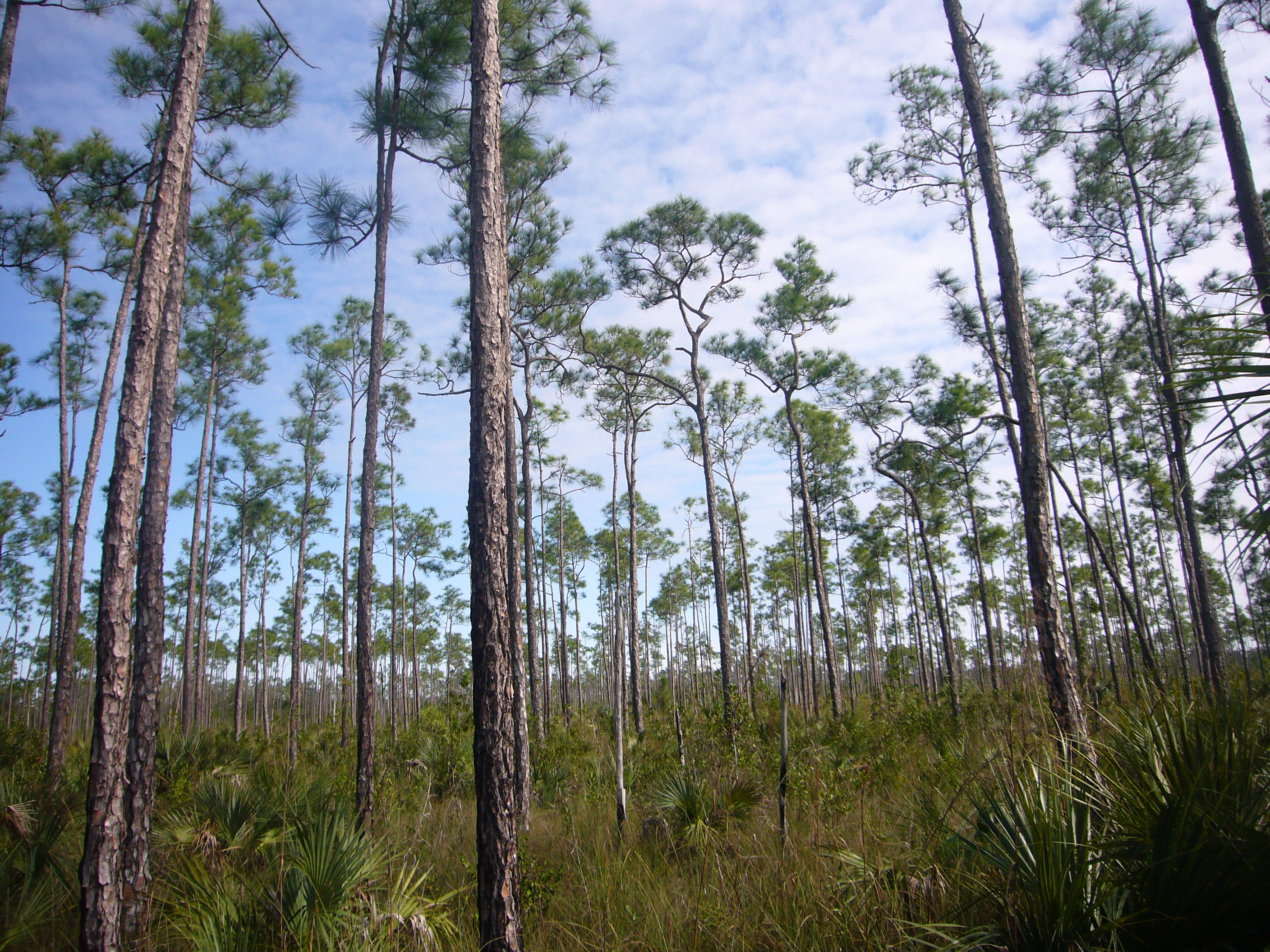 Сосна Эллиота (Pinus elliottii). Национальный парк Эверглейдс, США